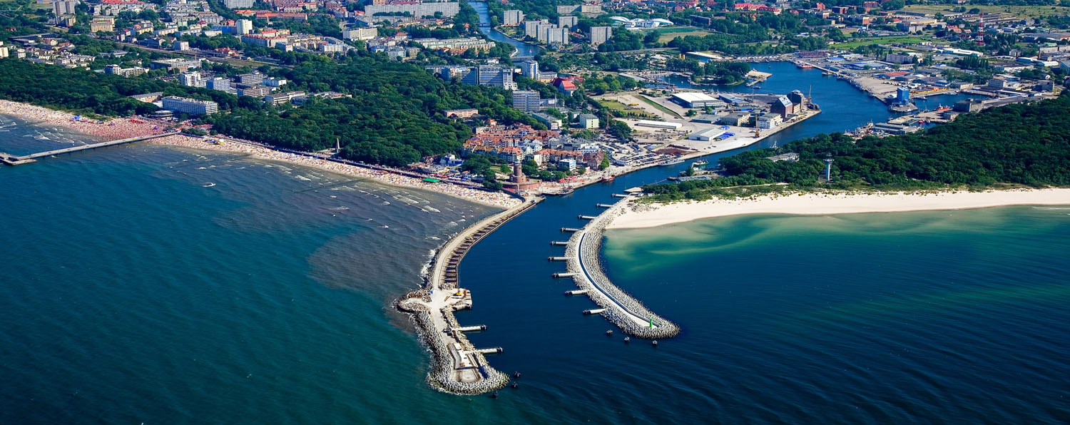 Kołobrzeg, wejście do portu